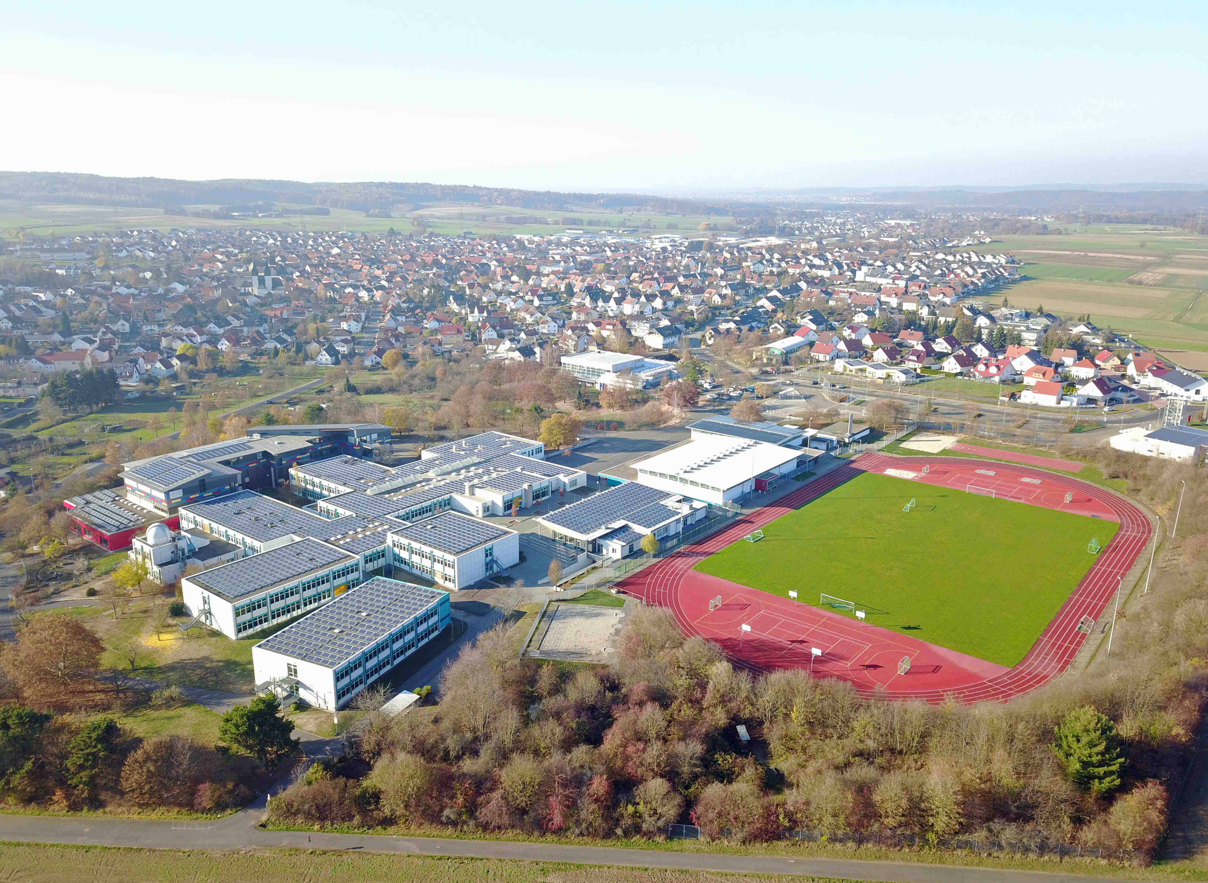 Kopernikus-Schule am 18.11.2018 (Additive Gesamtschule Freigericht / GSF; Blickrichtung Westen; im Hintergrund Freigericht-Somborn)